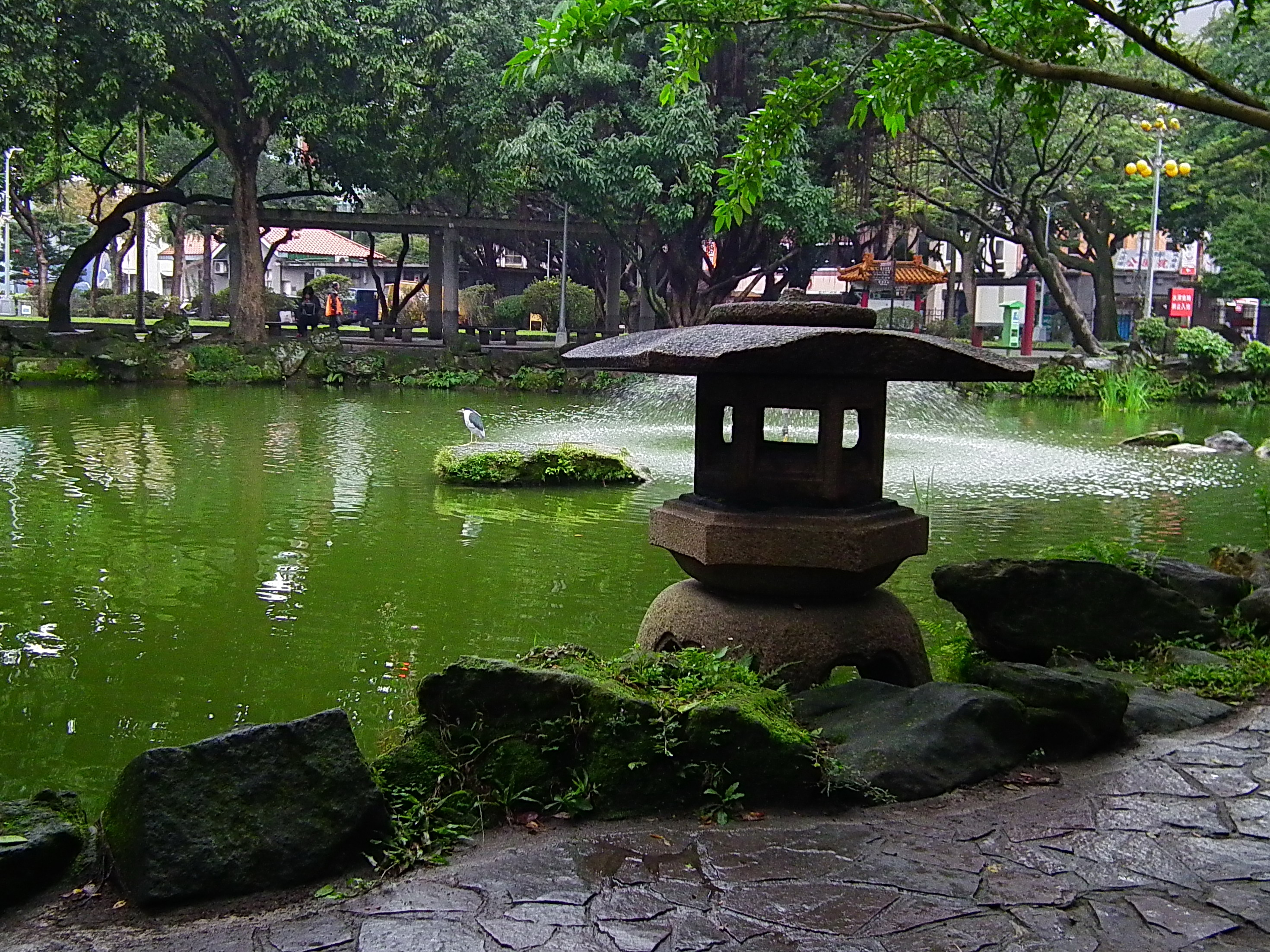 石燈籠 Stone Lantern